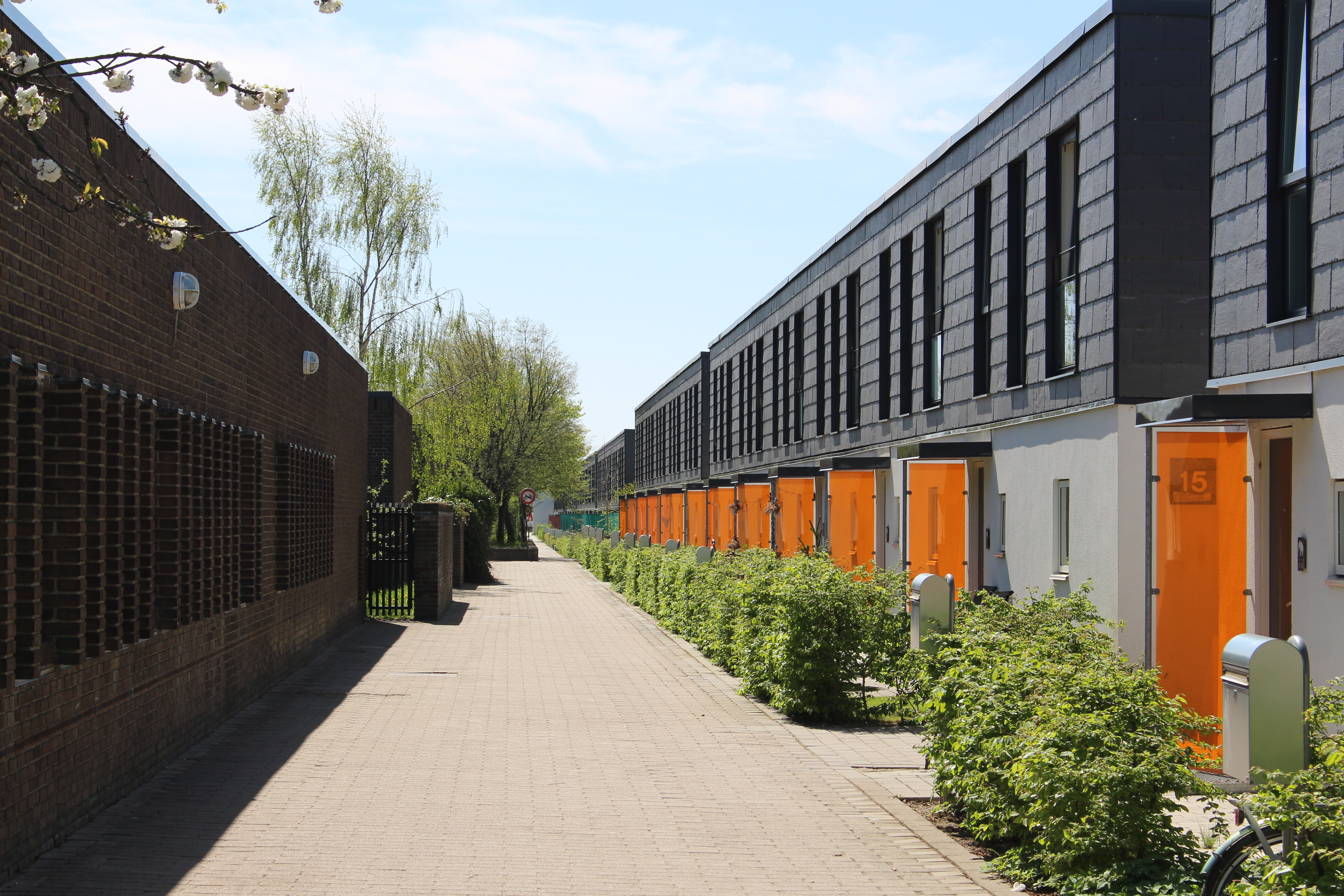 Rækkehuse i Albertslund Syd